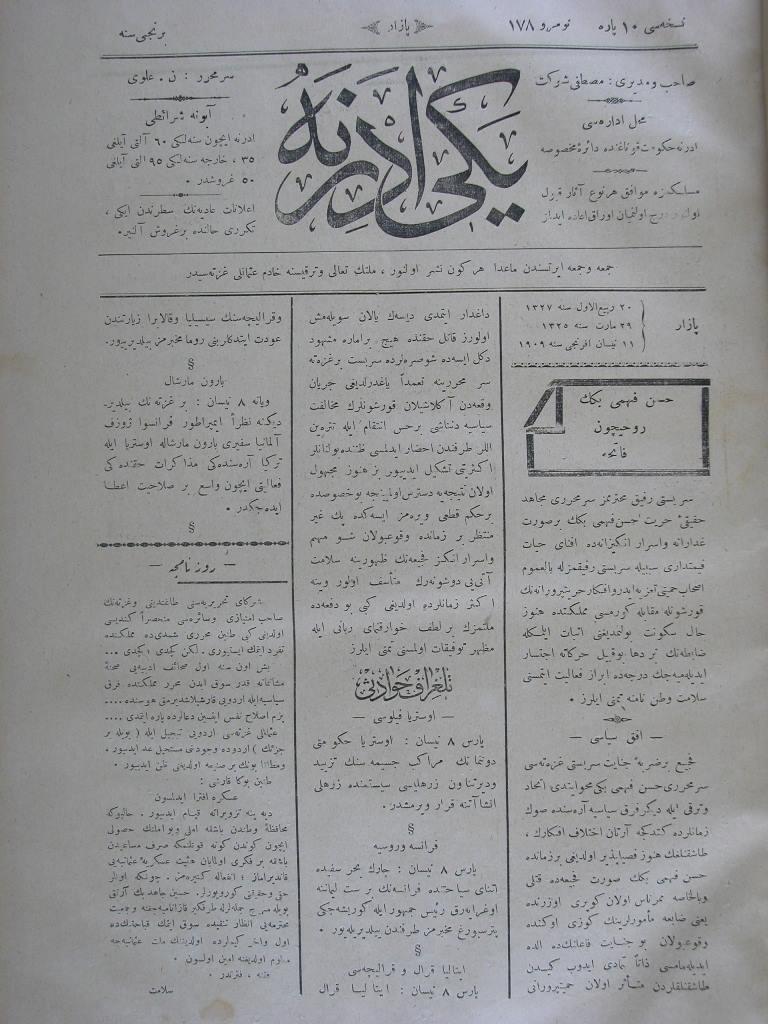 Yeni Edirne gazetesi, Cem Altınel Koleksiyonundan